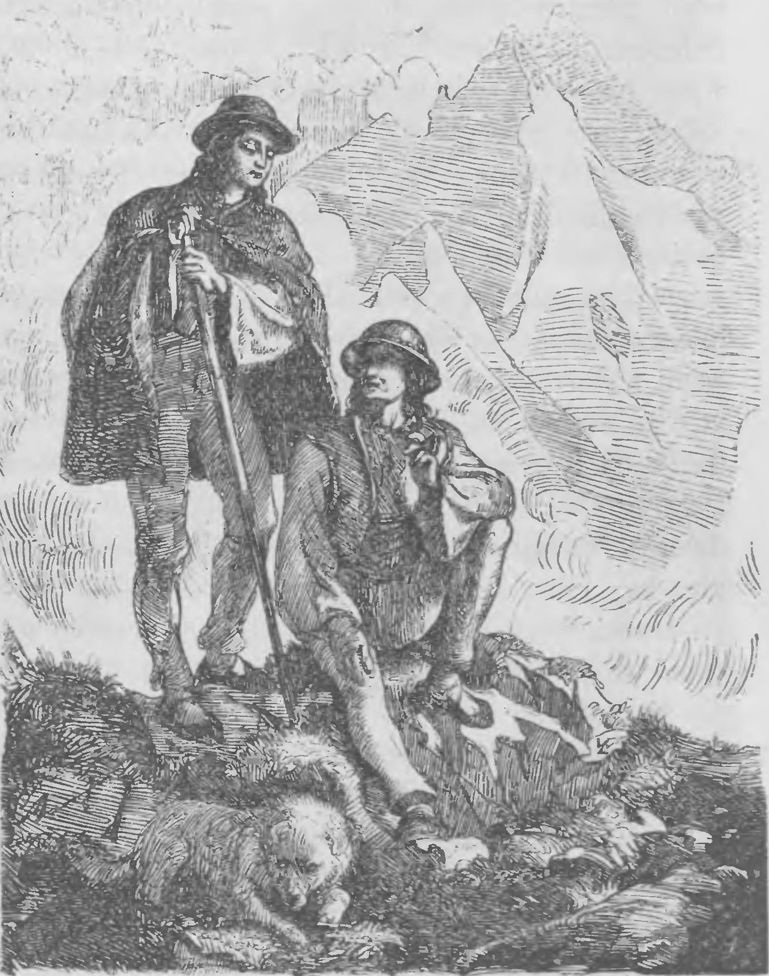 Ilustracja do „Illustrowanego przewodnika do Tatr, Pienin i Szczawnic” Walerego Eljasza-Radzikowskiego. Oryginalny opis:„Juhasy”.